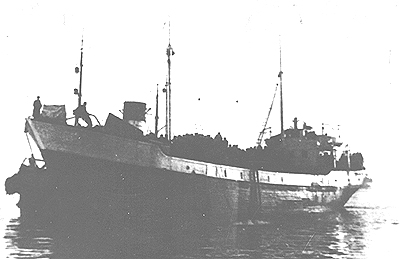 אוניית המעפילים בונים ולוחמים